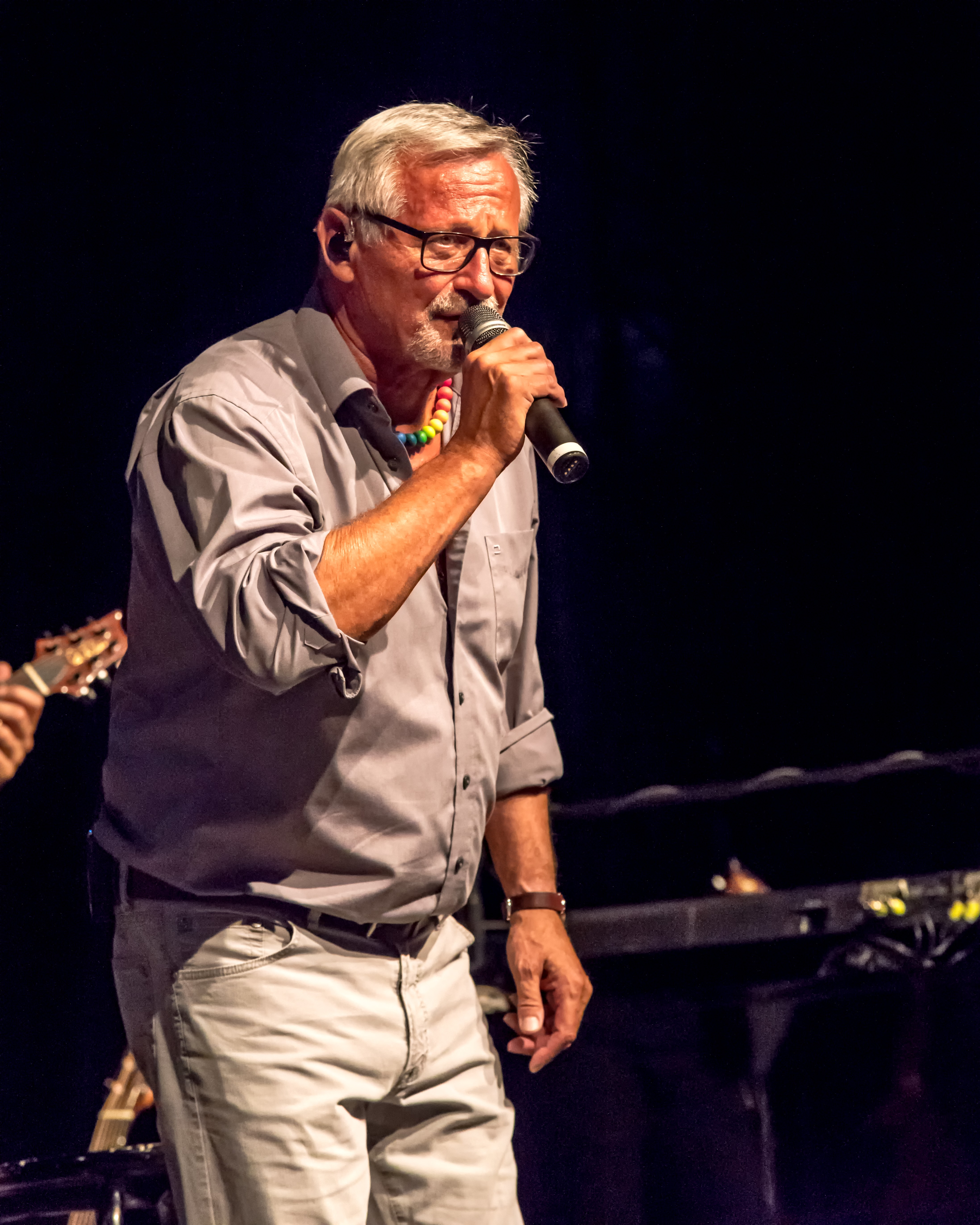 Bilder vom Zelt Musik Festival 2017 in Freiburg im Breisgau Konstantin Wecker (ZMF 2017) am 17.07.2017